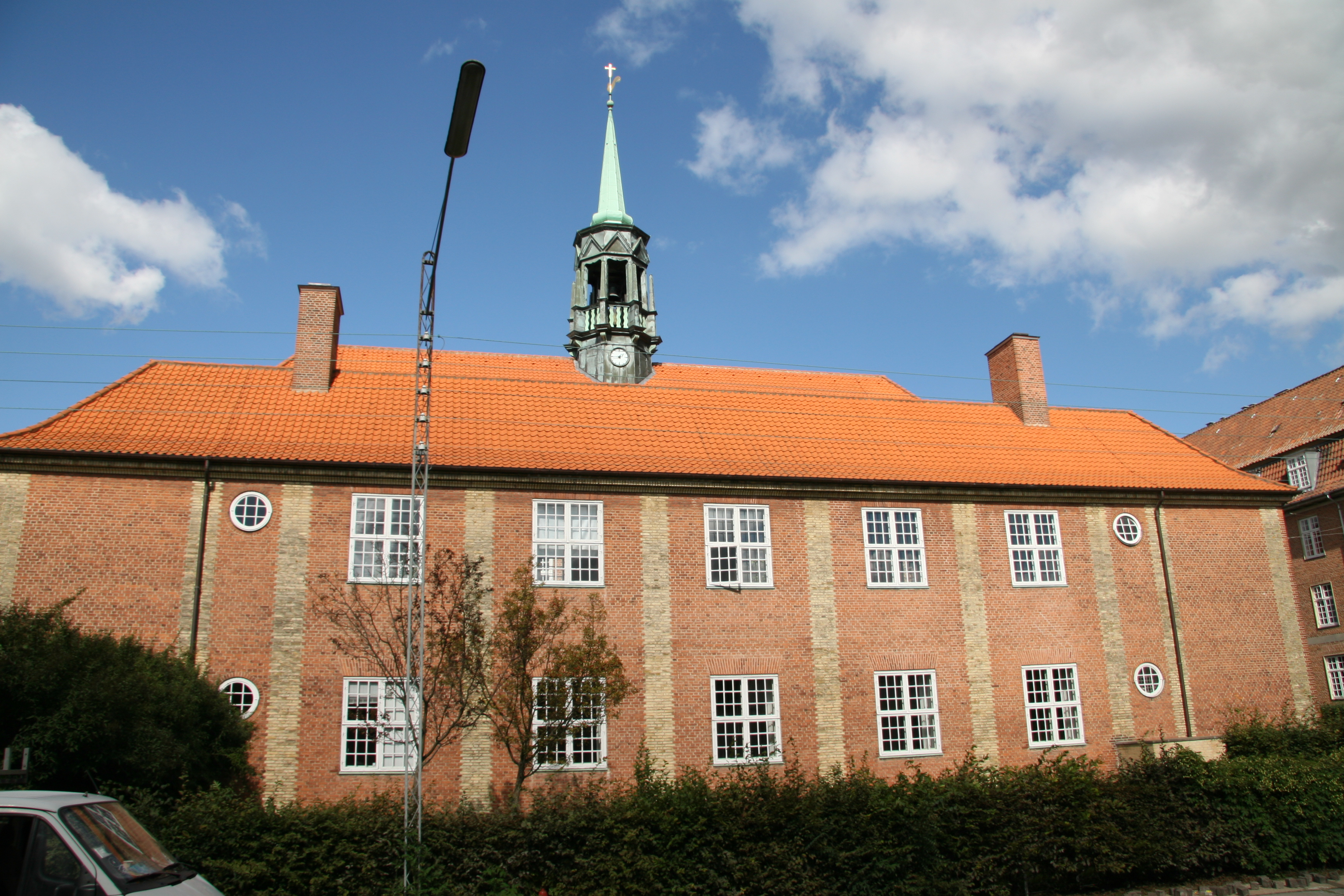 Lindevang Kirke in Copenhagen, Denmark. en: Parish hall. da: Menighedshuset.